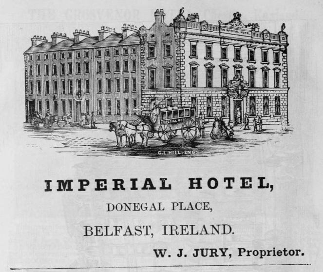 Hotel advertisement